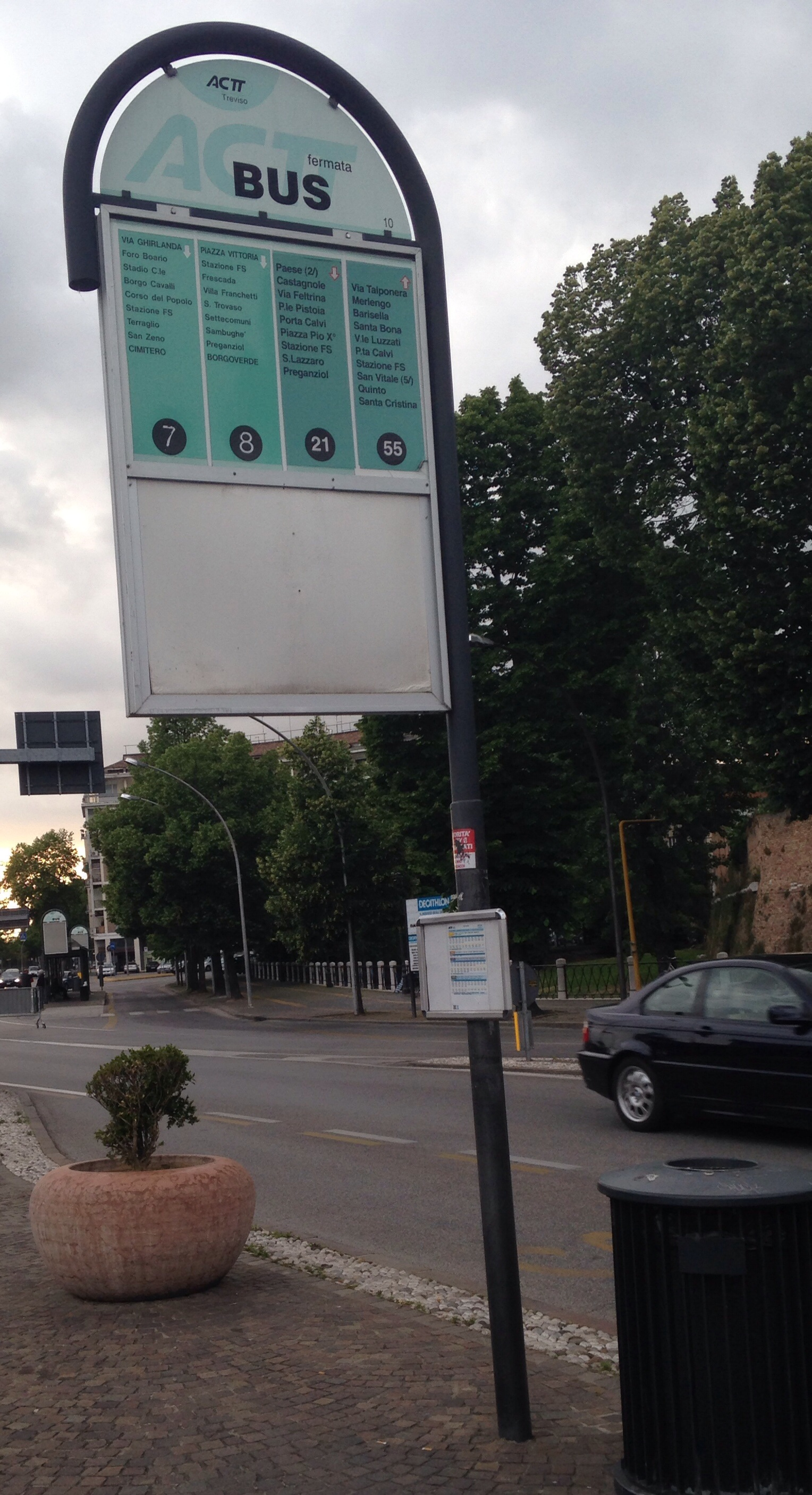 Palina ACTT presso la fermata di Treviso Stazione FS in Treviso